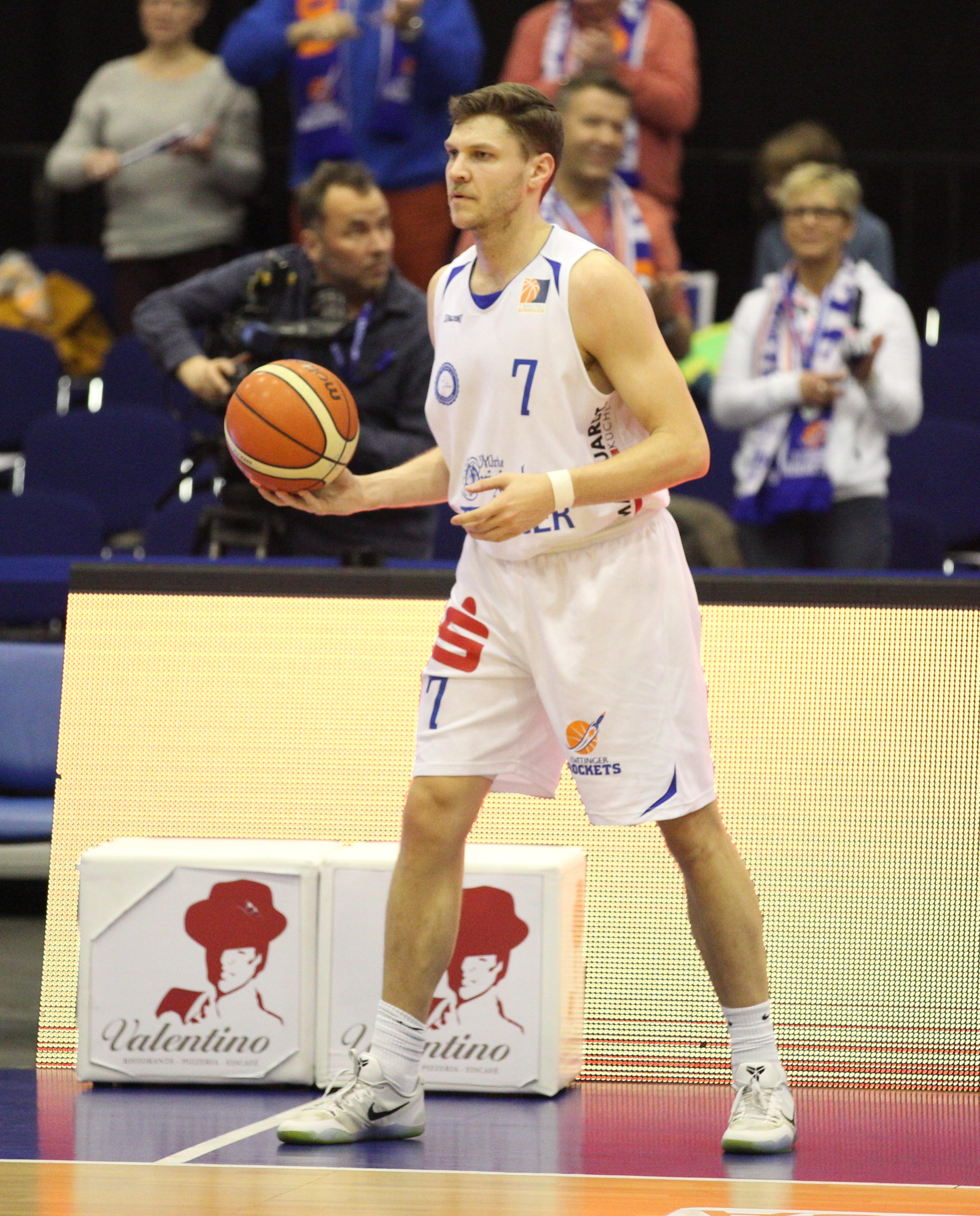 2. Basketball-Bundesliga (21. Spieltag; 2. Februar 2017; Game-ID: 102913): Grant Gibbs (7, Oettinger Rockets)